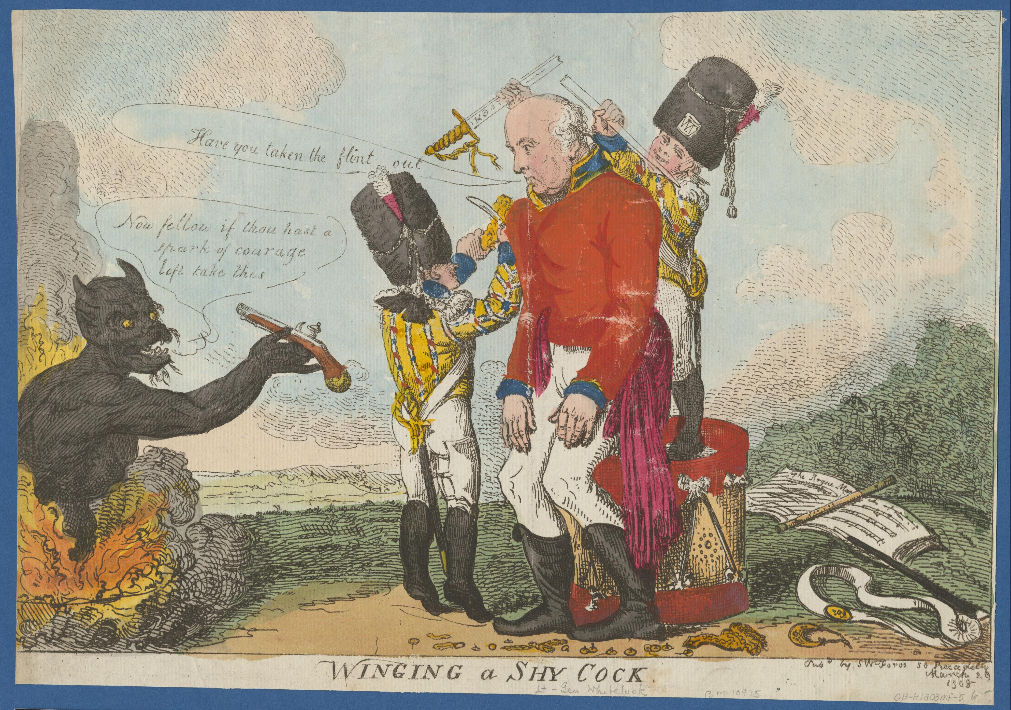 Caricatura sobre la degradación del oficial del ejército británico John Whitelocke, ocurrido a causa de su fracaso militar en el marco de las Invasiones Inglesas en el Río de la Plata. En la imagen dos chicos del tambor le quitan las charreteras y quiebran su sable. Un diablo le alcanza un arma para que se suicide diciendole "Now fellow if thou hast a spark of courage left take this" (ahora amigo si te queda una chispa de coraje toma esto) y Whitelocke pregunta "Have you taken the flint out" (Le has sacado el pedernal). Debajo de la imagen aparece el subtexto "Winging a shy cock". Esta frase parece ser un juego de palabras que que usa el doble significado de "cock" (gallo o jefe) al comparar la remoción de las alas de un "gallo tímido" con la remoción del rango de un "jefe tímido". Esta caricatura fue editada por Samuel William Fores (1761 - 1838) en 1808.